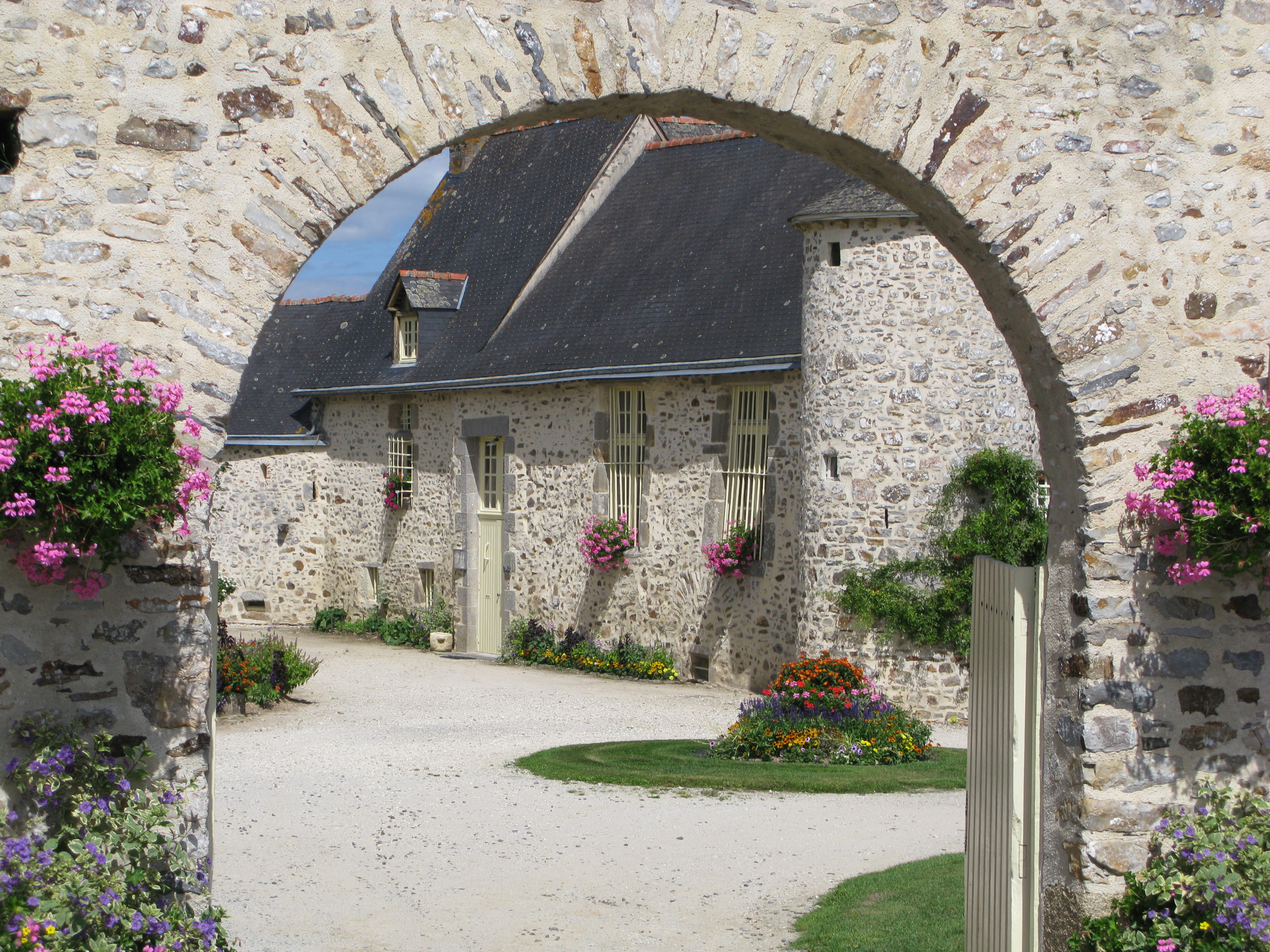 Mairie d'Olivet